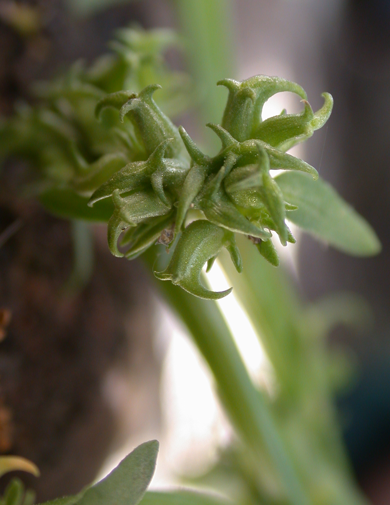 fruits of Valerianella echinata (L.) DC. (ולריינית דוקרנית), Har Evyatar, Upper Galilee, Israel, April 2008.